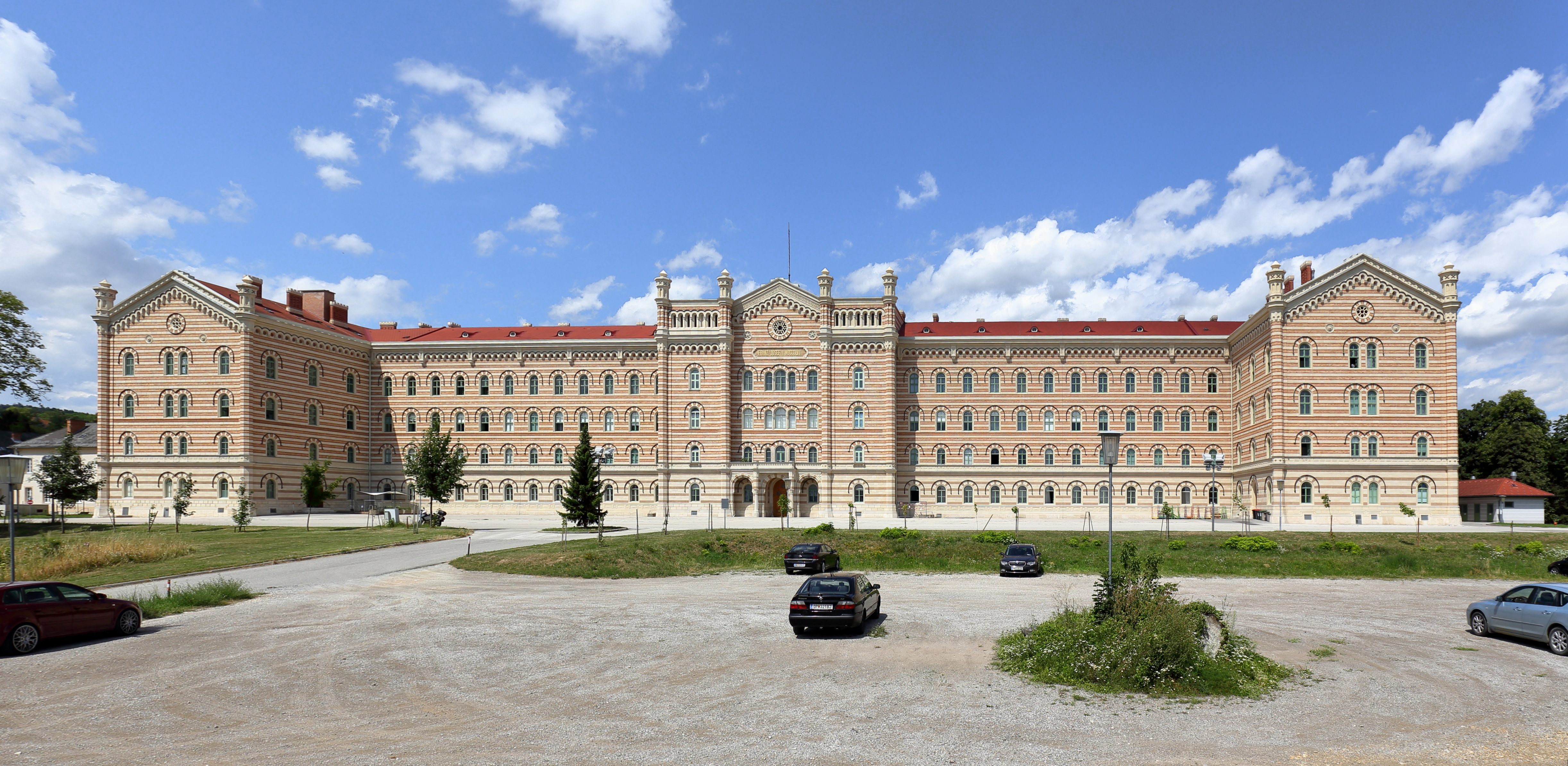 Südansicht des Hauptgebäudes der Martinkaserne in der burgenländischen Landeshauptstadt Eisenstadt.Der Komplex wurde unter der Bauleitung von Sigismund von Malinowski von 1853 bis 1858 als k.k. Kadetteninstitut am Südhang des Leithagebirges errichtet. Das Hauptgebäude ist ein langgestreckter, symmetrischer dreiflügeliger Bau. Seit 1938 wird die Anlage, die 1967 nach dem Landespatron Martin benannt wurde, ausschließlich als Kaserne genutzt.